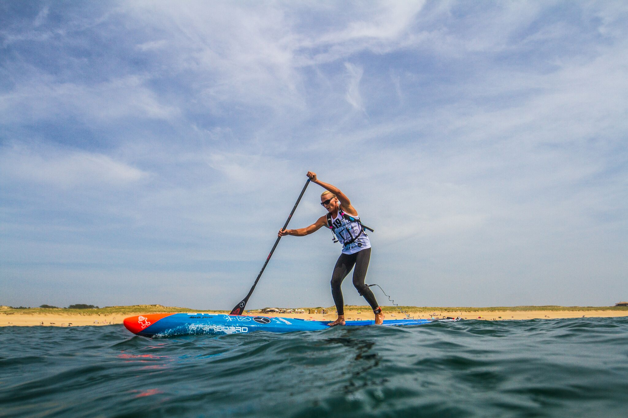 Sonni Hönscheid, Race Time By Georgia Schofield